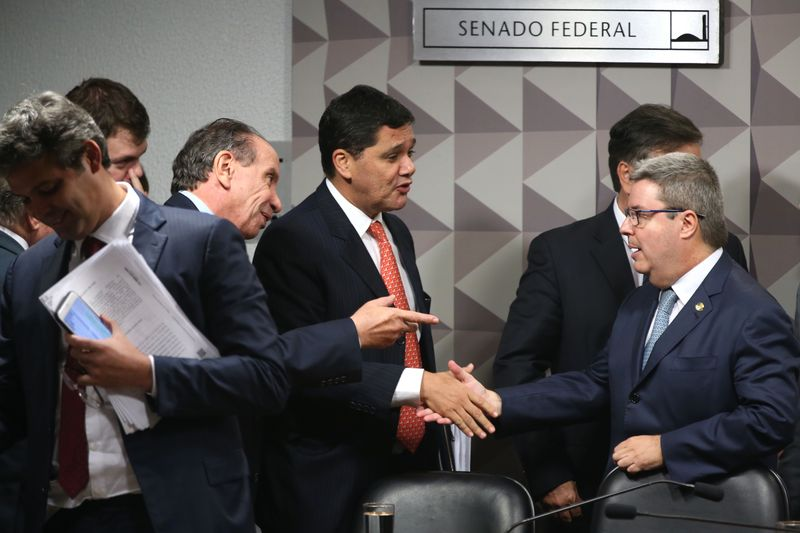 Leitura do relatório da comissão de impeachment de Dilma Rousseff no Senado.